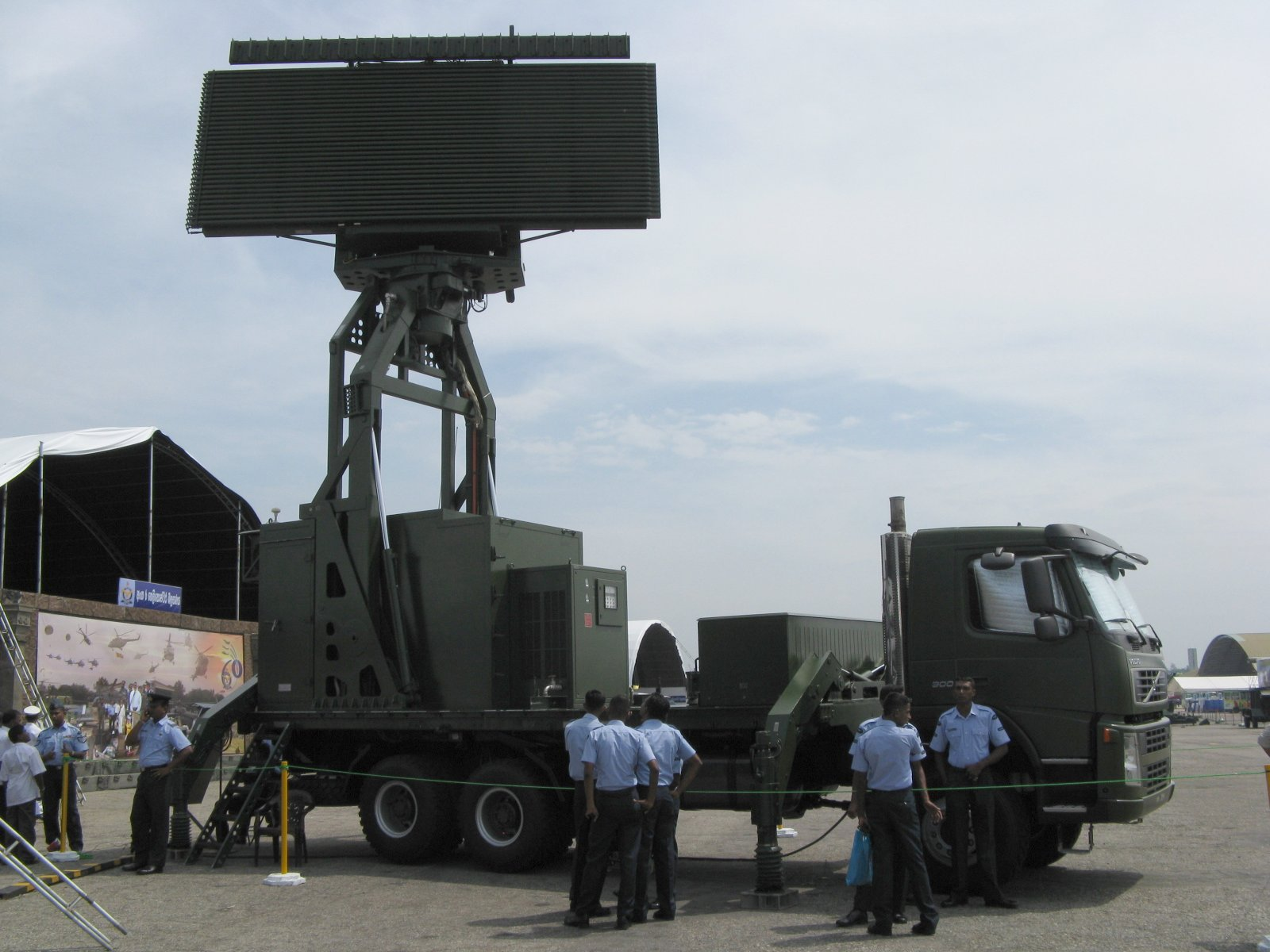 CETC YLC-18 3D Radar - Sri Lanka Air Force